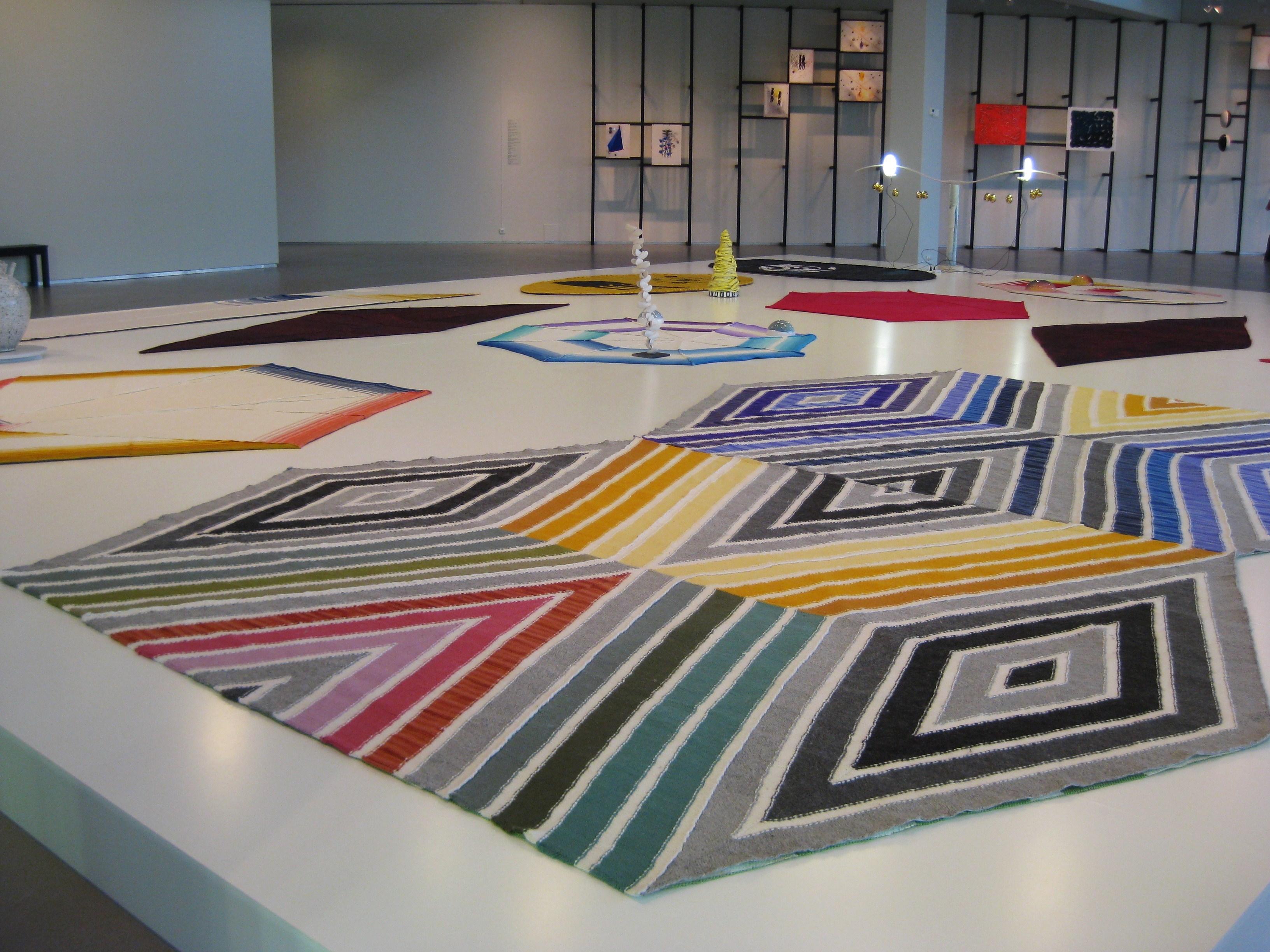 Onderdeel van de eerste tentoonstelling The Soul in Limbo van de winnaar van de Cobra Kunstprijs Amstelveen in 2015, Jennifer Tee, in het Cobra Museum in Amstelveen. Gebreide vloervormen.